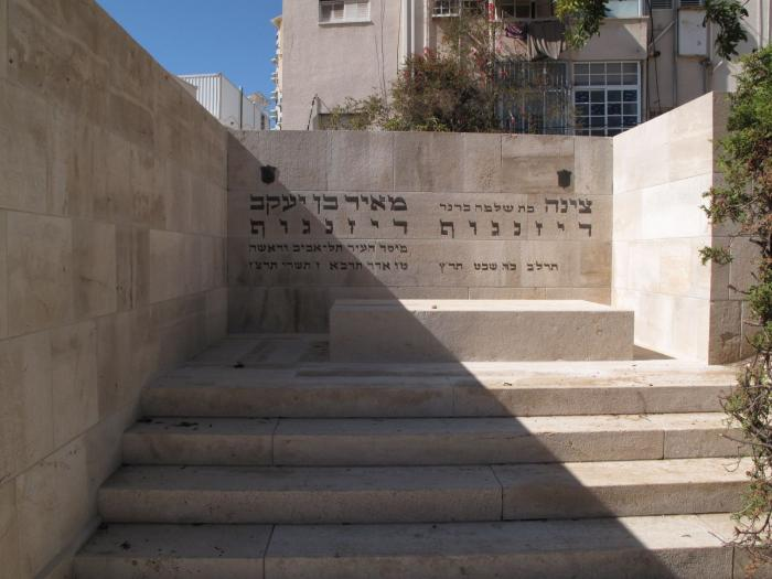 הקבר בבית הקברות הישן ברחוב טרומפלדור